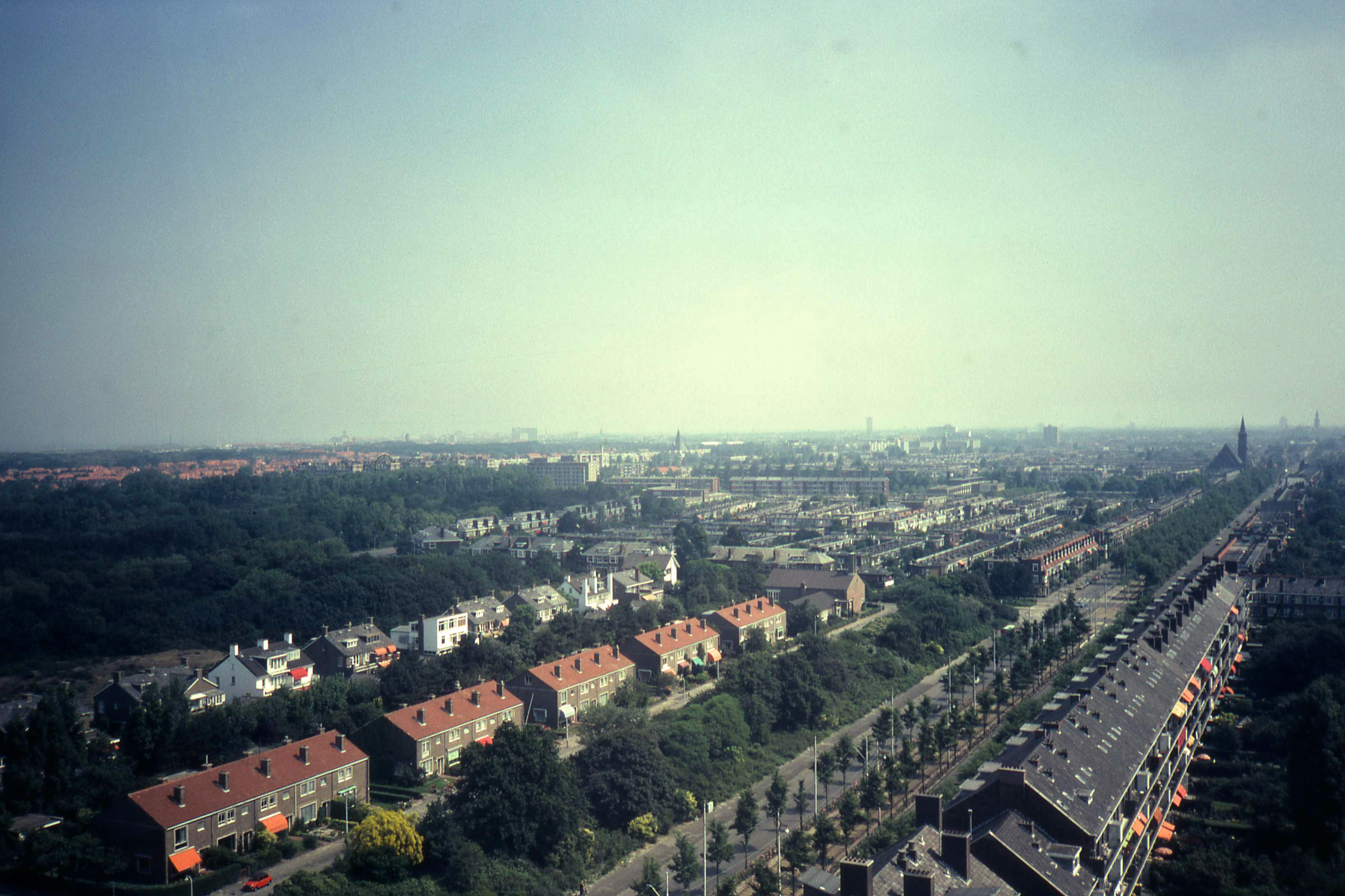 Zicht op de Laan van Meerdervoort gezien vanaf het kantoorgebouw op de Lohmansplein in 1982